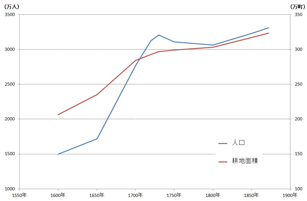 population and agricultural area in edo period